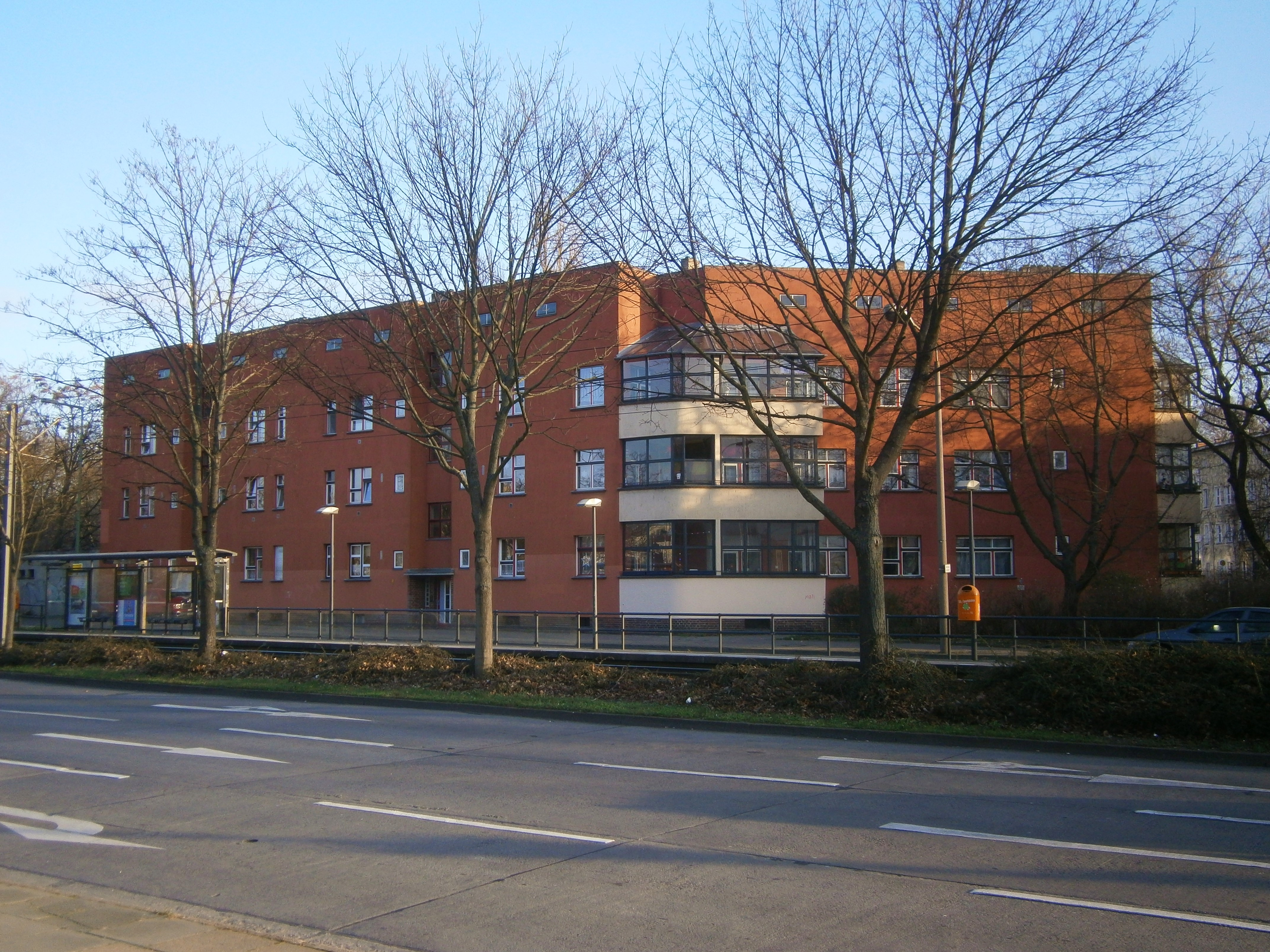 Die Hansastraße ist eine Berliner Straße mit übergeordneter Bedeutung in den Ortsteilen Alt-Hohenschönhausen und Weißensee. Sie liegt zwischen der Indira-Gandhi-Straße und der Großsiedlung Hohenschönhausen-Nord. Im Bild der Blick zum denkmalgeschützten Wohnhaus Hanastraße 174 176 an der Ecke Buschallee.